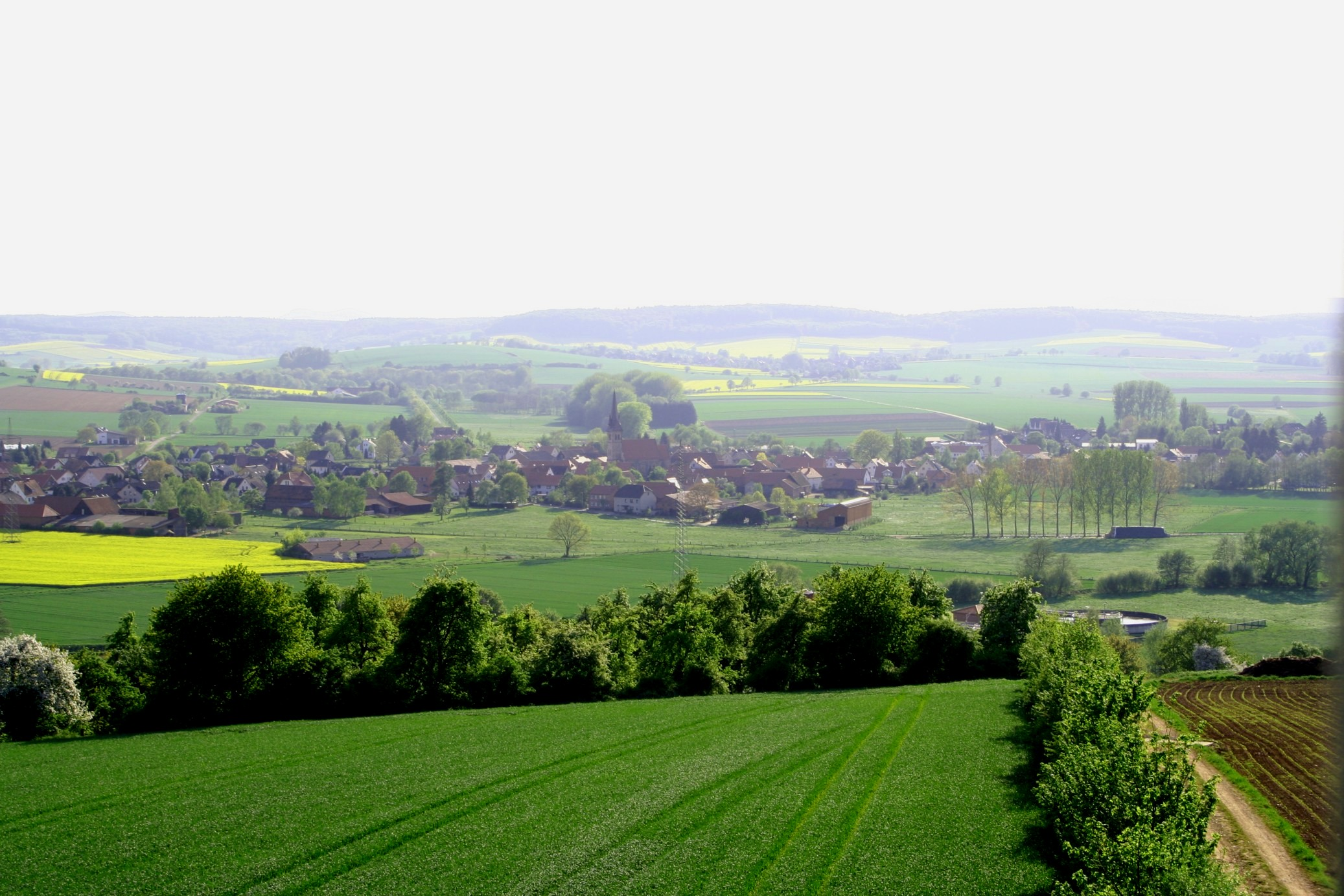 Blick auf Westerode vom Suhlberg